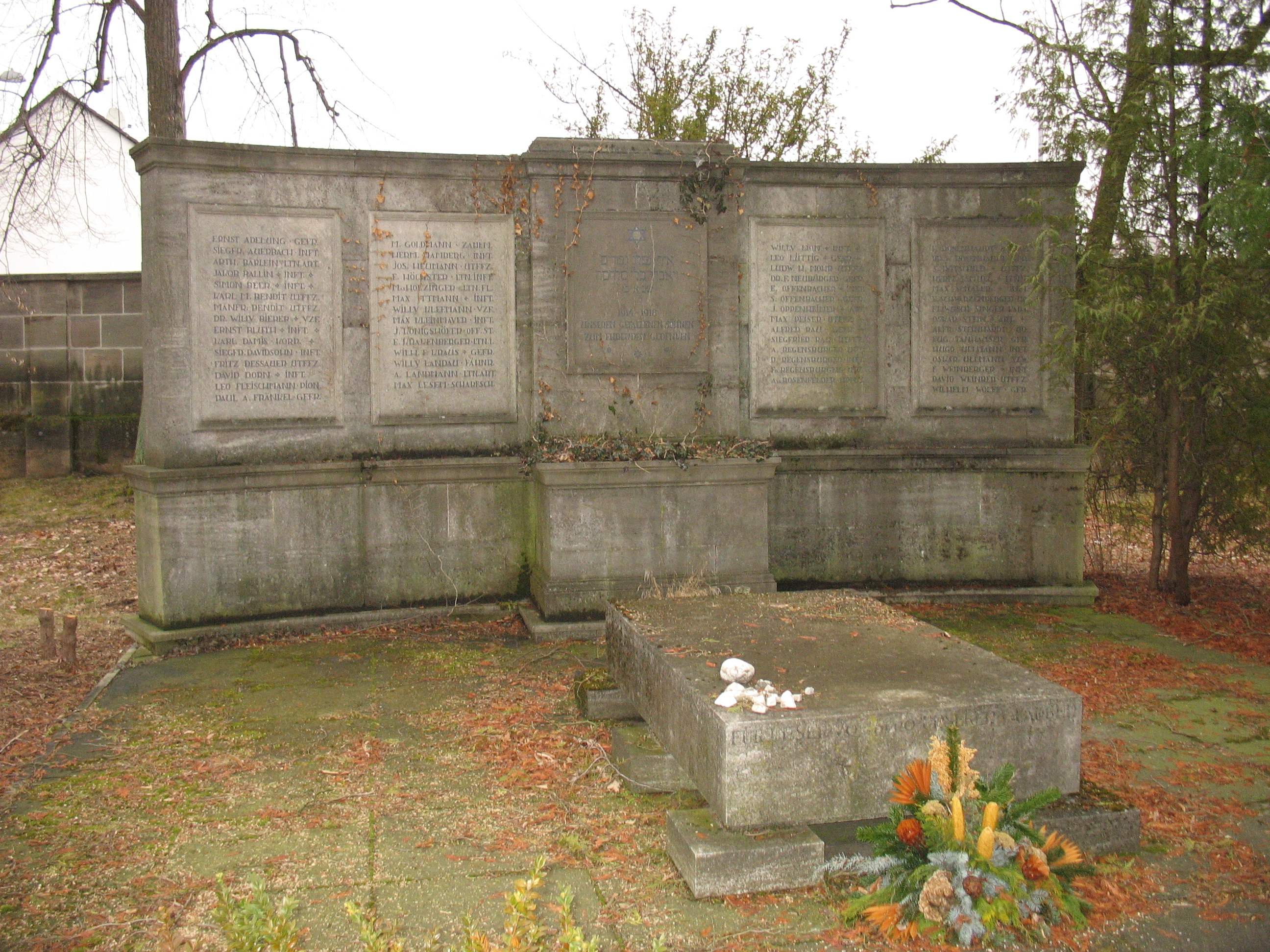 Shoa-Gedenkstein am Neuen Jüdischen Friedhof in Fürth, im Hintergrund Denkmal für die jüdischen Gefallenen im 1. Weltkrieg.